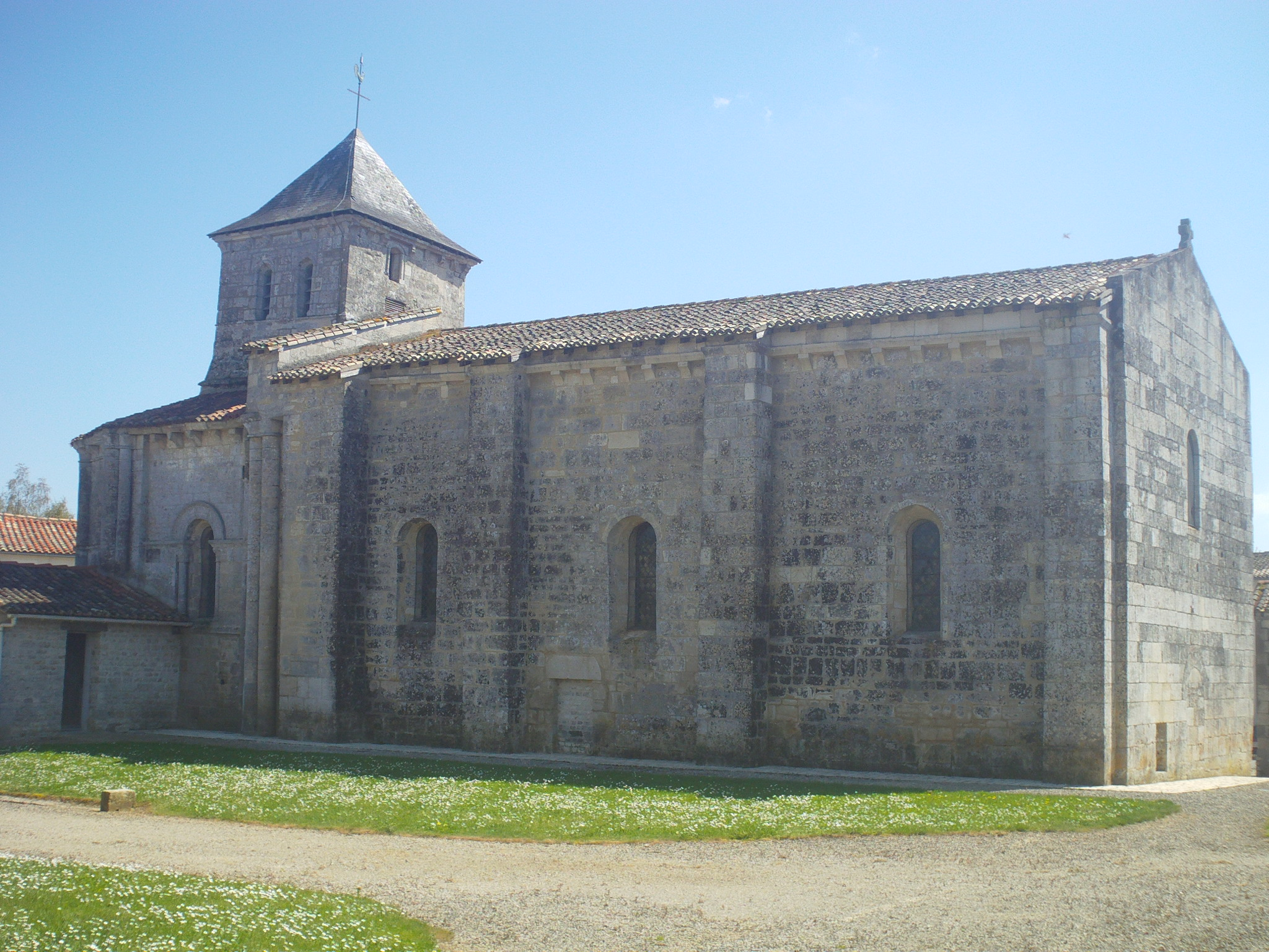 Vue de la face nord de l'Église Sainte-Eugénie de Sainte-Ouenne. Le bâtiment est de style roman et a été construit au XIIème siècle.